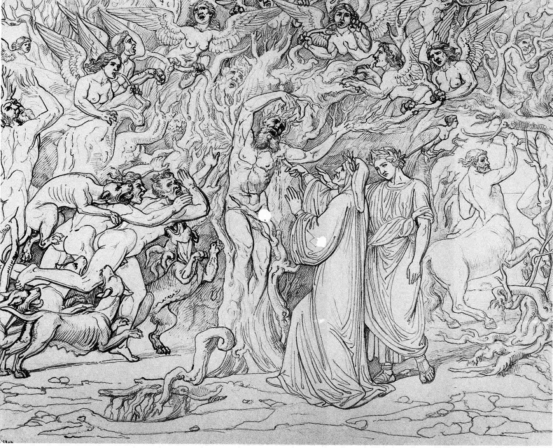 Dante, canto XIII